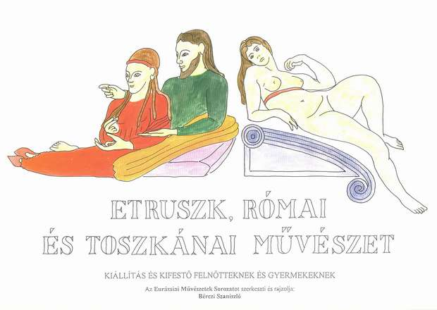 Etruszk művészeti füzet borítója